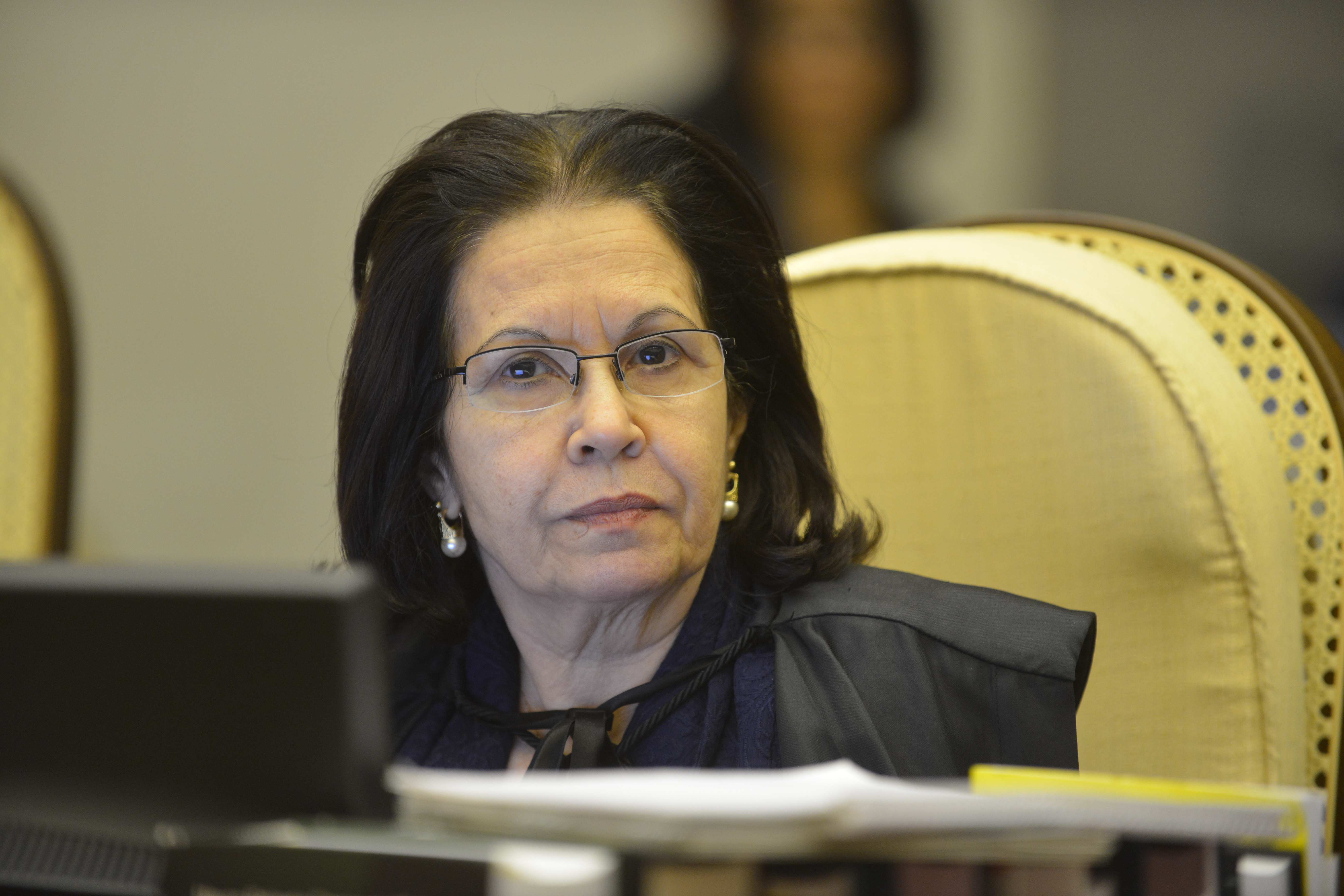 Ministra Vice-Presidente Laurita Hilário Vaz